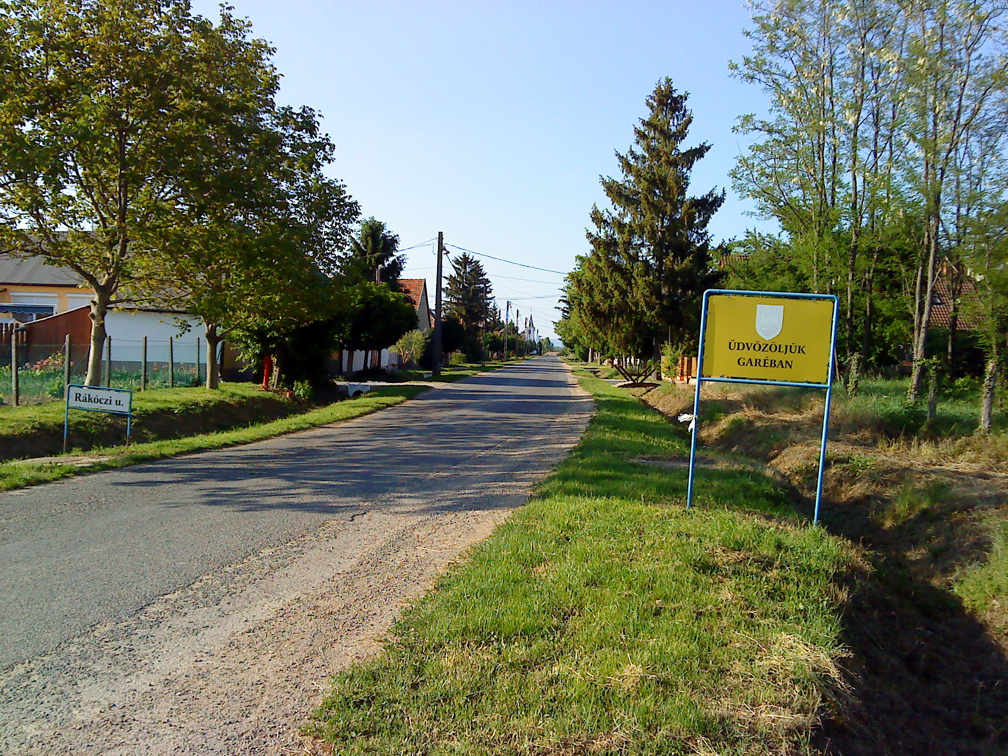 Garé déli vége